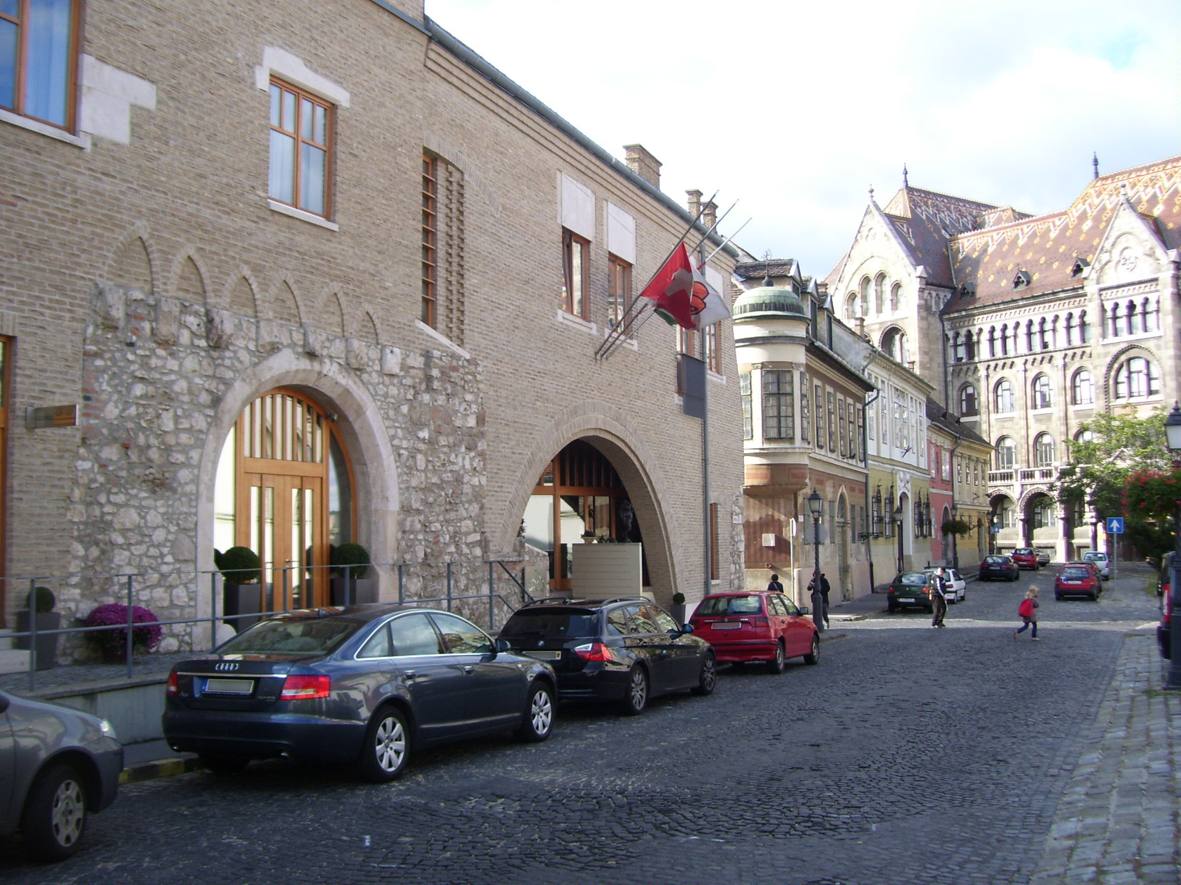 Budapest, I. Fortuna utca 18., HAPIMAG-irodaház, épült 2000-ben